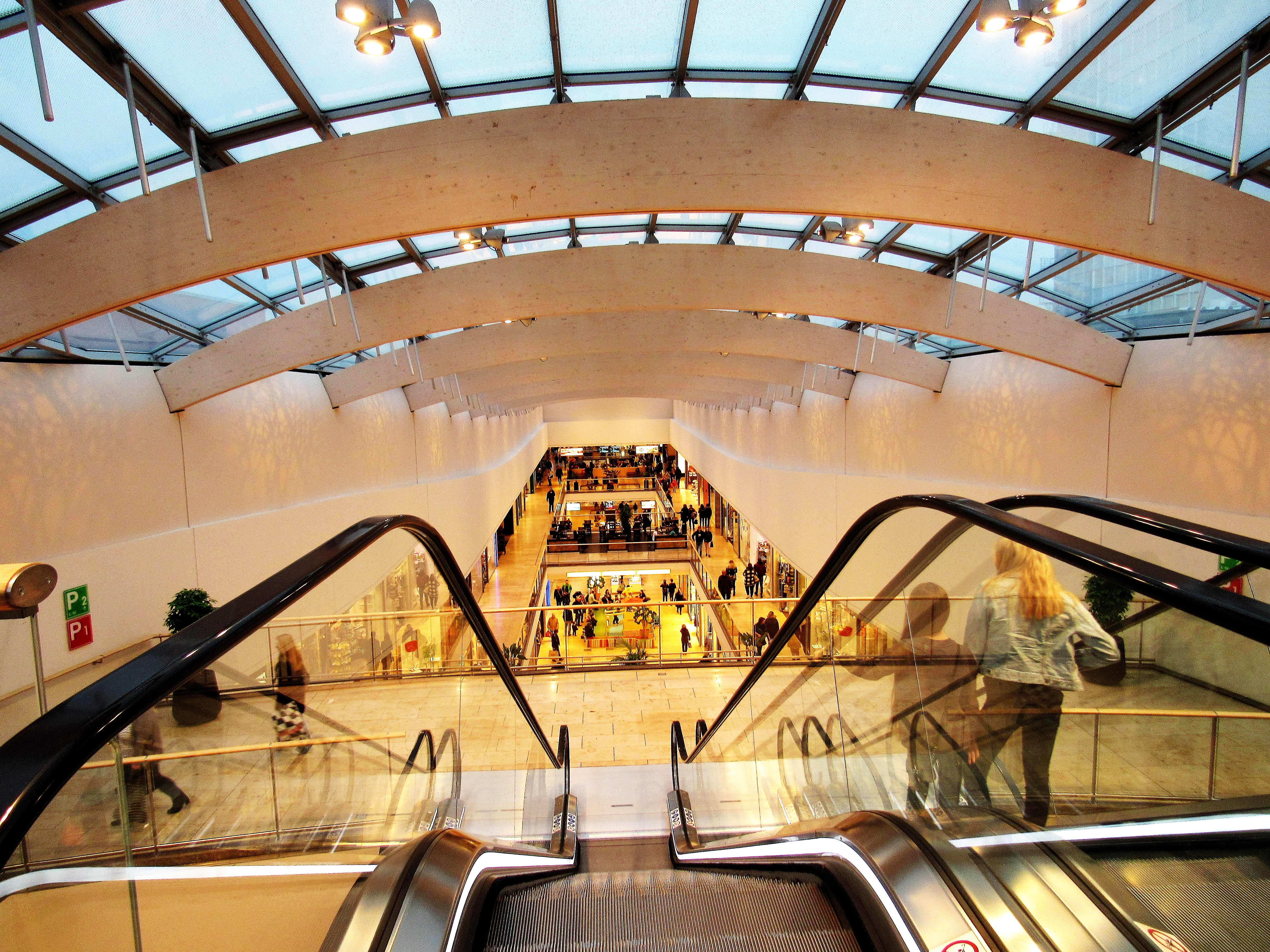 Einkaufsgalerie Schweinfurt